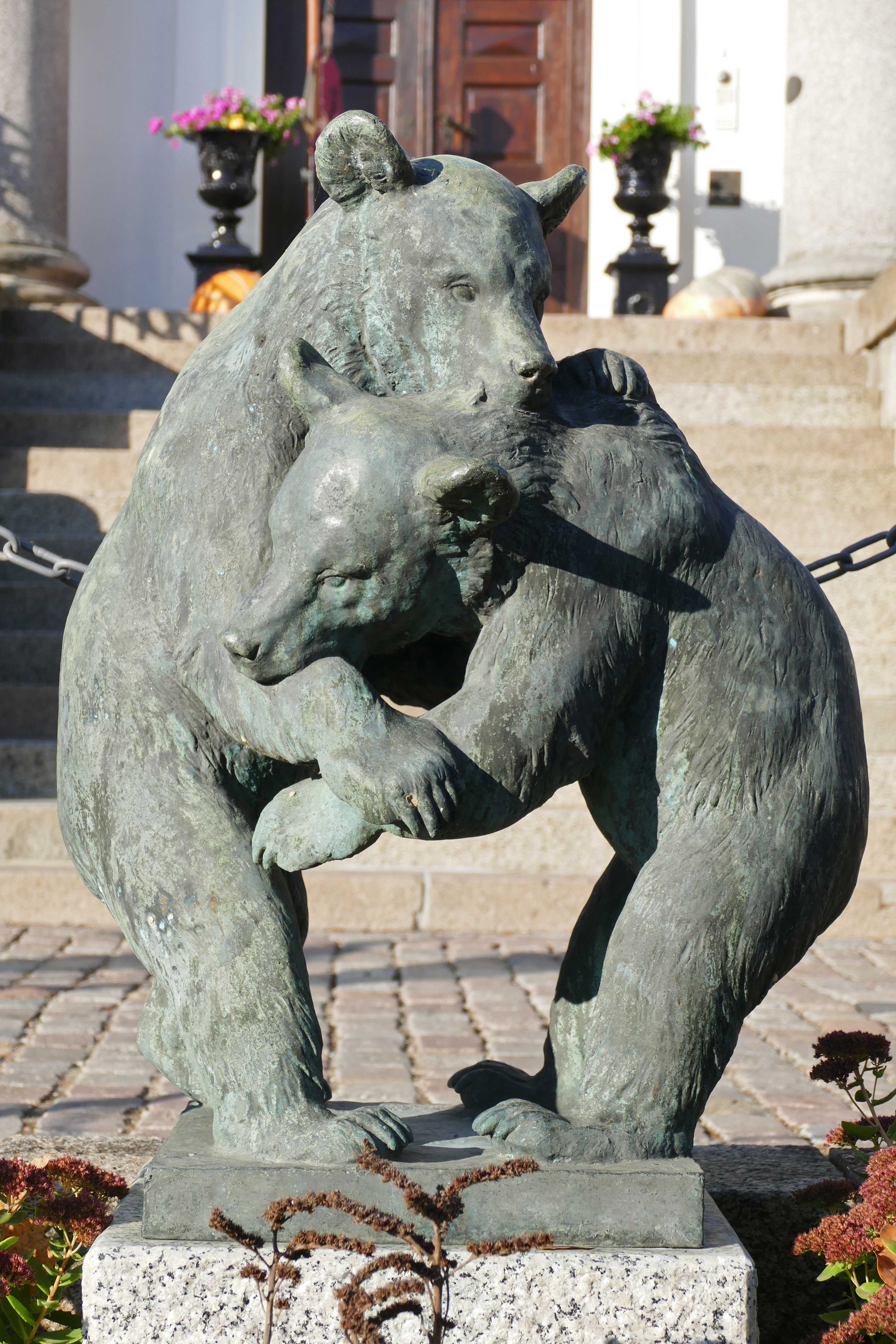 Burg Schlitz Bärenskulptur vor dem Haupteingang